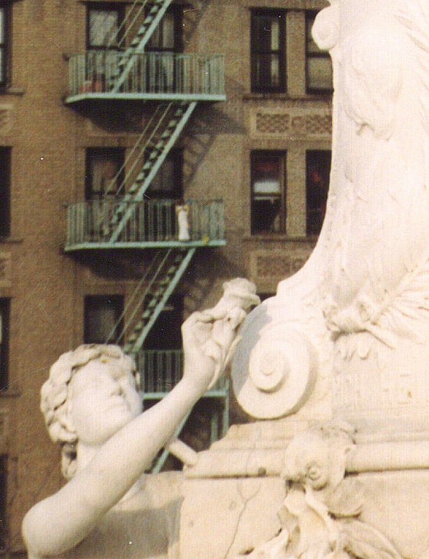 Heinrich-Heine-Denkmal in der Bronx, New York, Detail